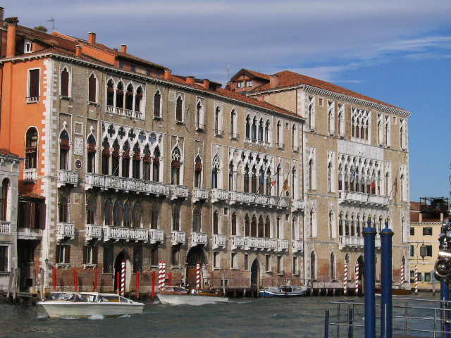 Palazzi Giustinian (left) and Ca' Foscari in Venice from Palazzo Grassi